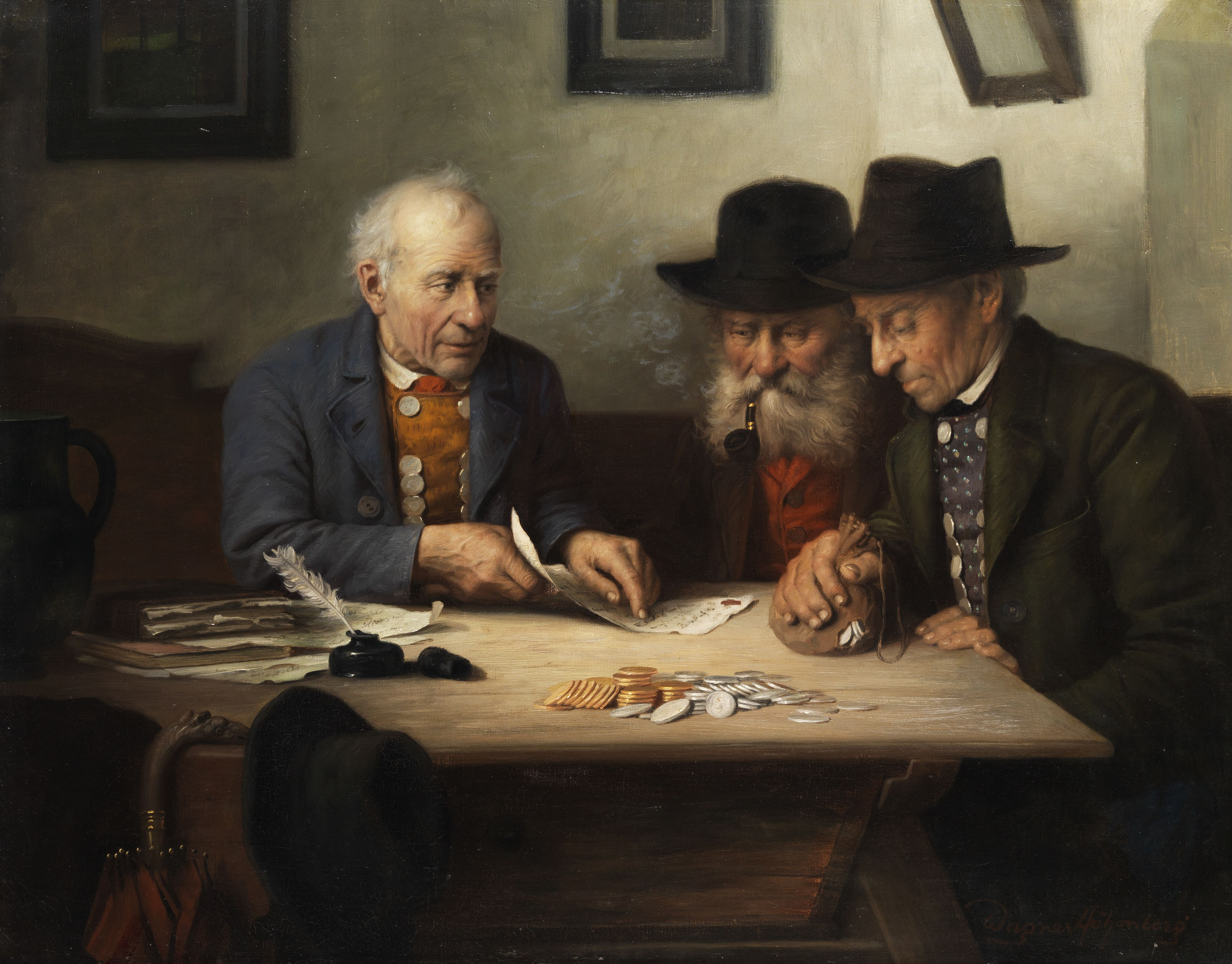 Die Abrechnung. Öl auf Leinwand. 55,4 x 70 cm.Rechts unten signiert.